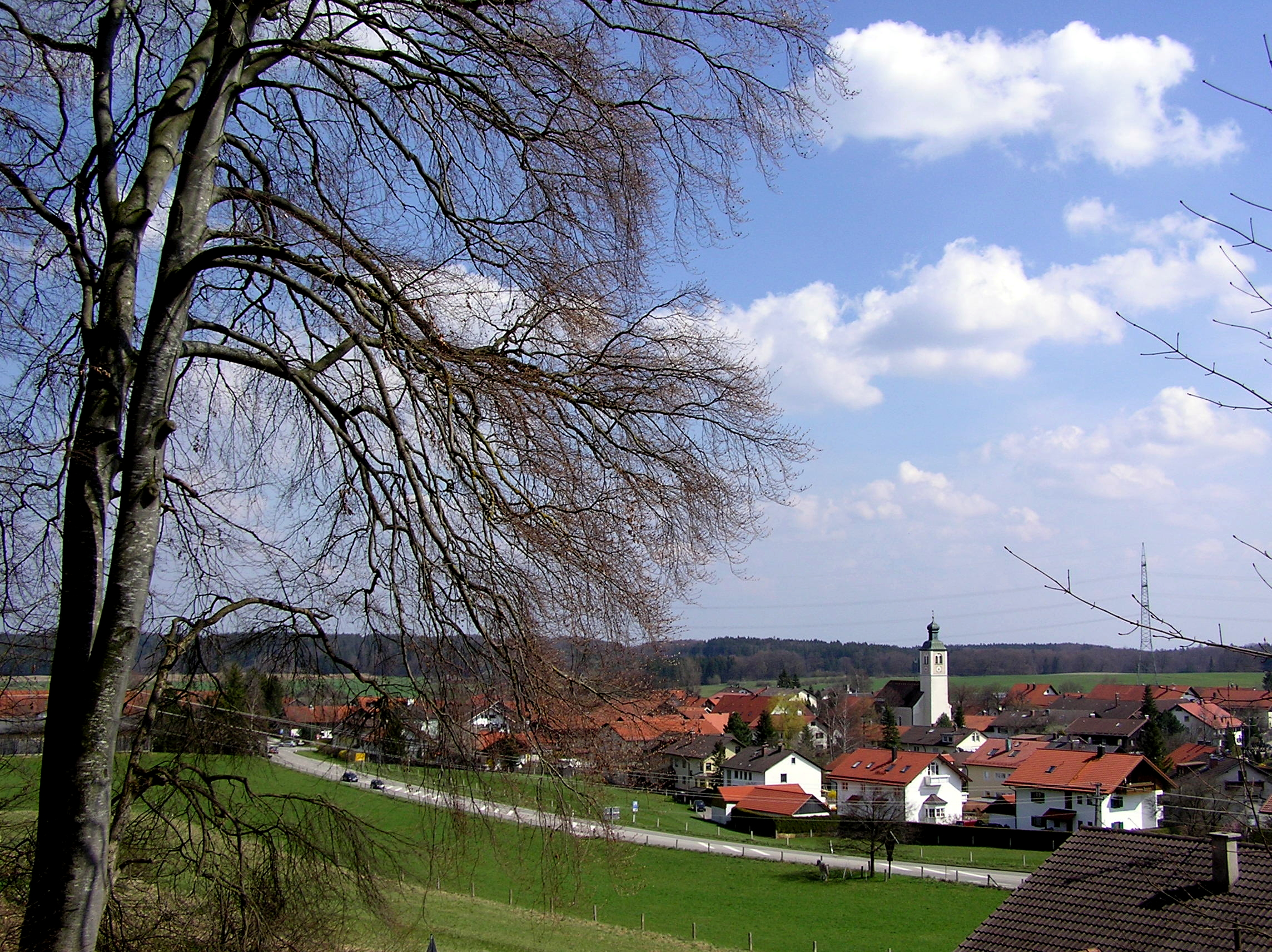 Starnberg, OT Perchting. Blick vom Kalvarienberg auf das Pfarrdorf Perchting.